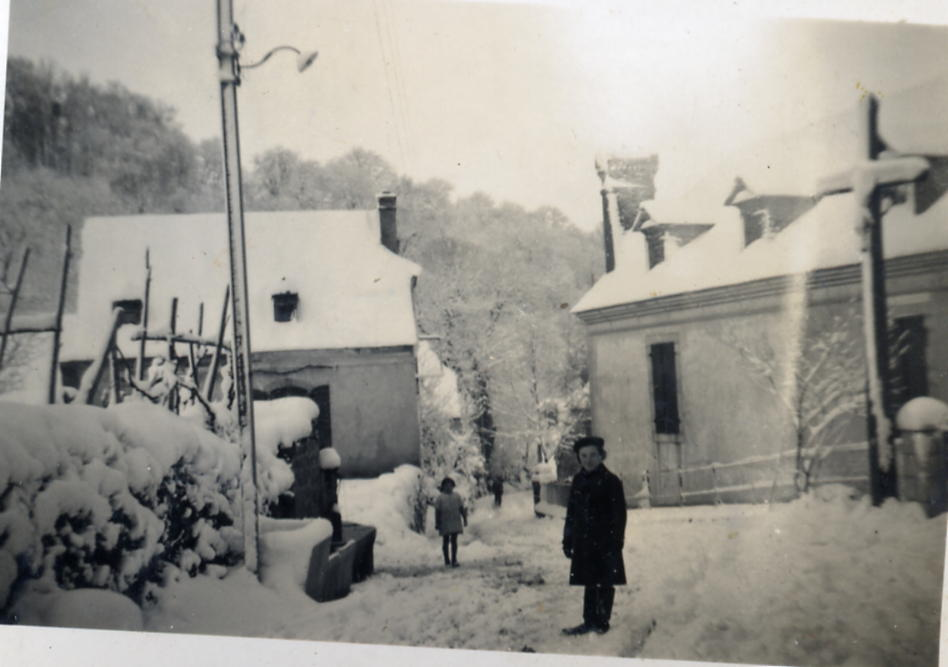 Maryse Darré photographiée au centre du village pendant l'hiver 1940 (photo faite sa mère pour un envoi à son père mobilisé sur le front). L'ancienne maison de Lahaille se trouve à l'arrière plan, à gauche. Présence du calvaire près du portillon, à l'entrée de la maison Pouzadé à droite. On notera aussi la présence d'un lampadaire fixé sur le pylône électrique (l'électrification du village a été réalisée vers 1934).